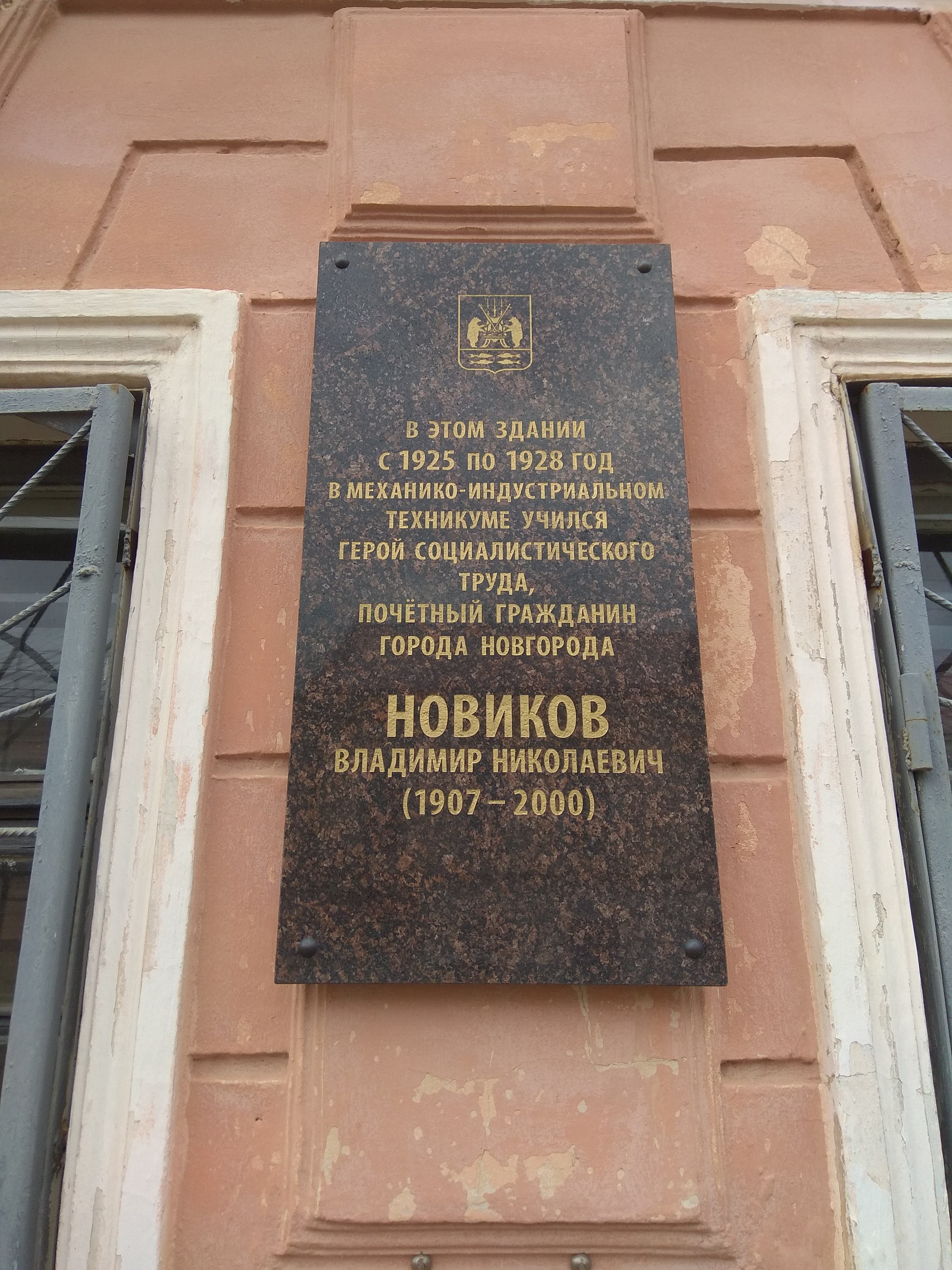 Памятная доска. Ильина улица 3/22, Великий Новгород